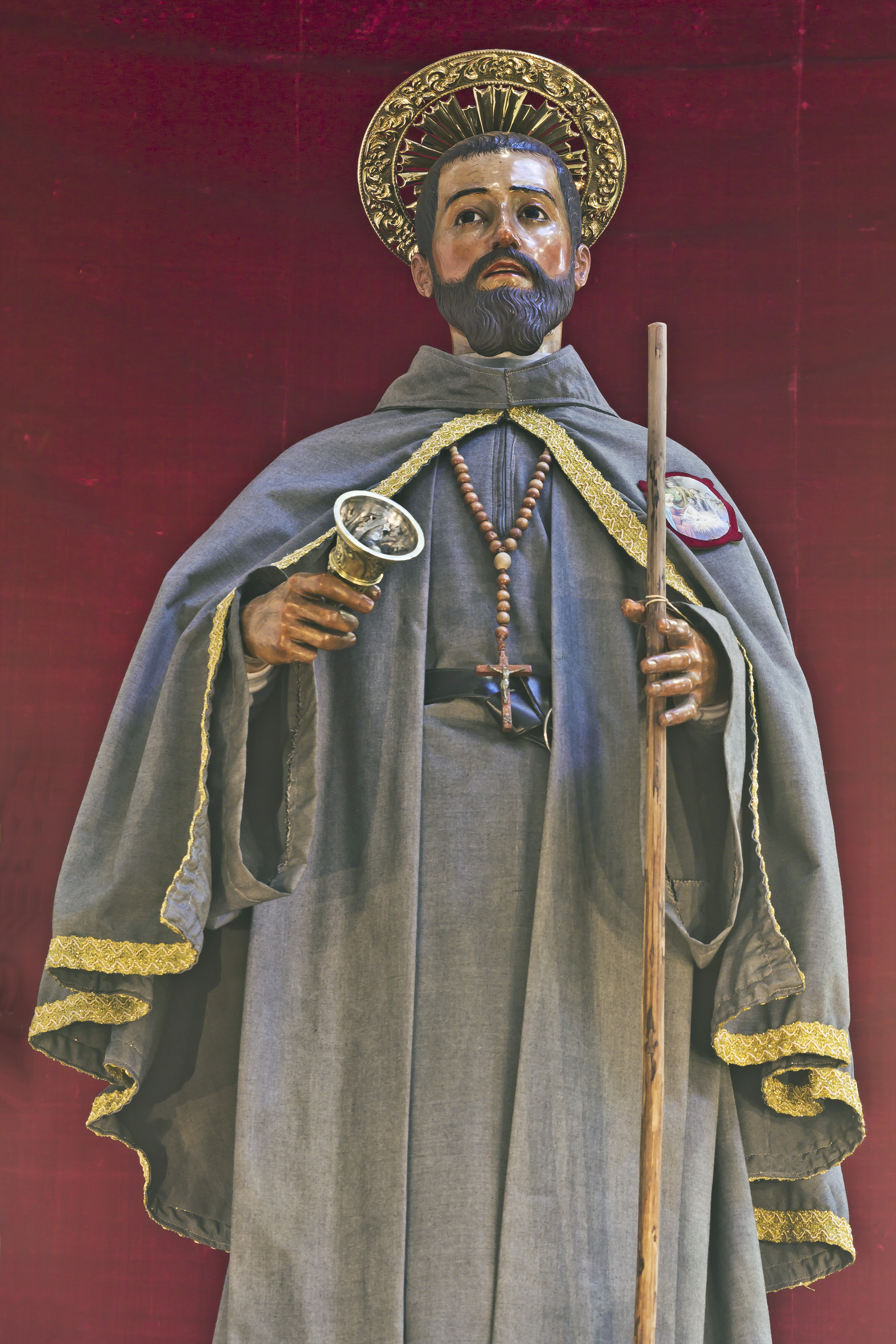 Santo Hermano Pedro en la Catedral de La Laguna